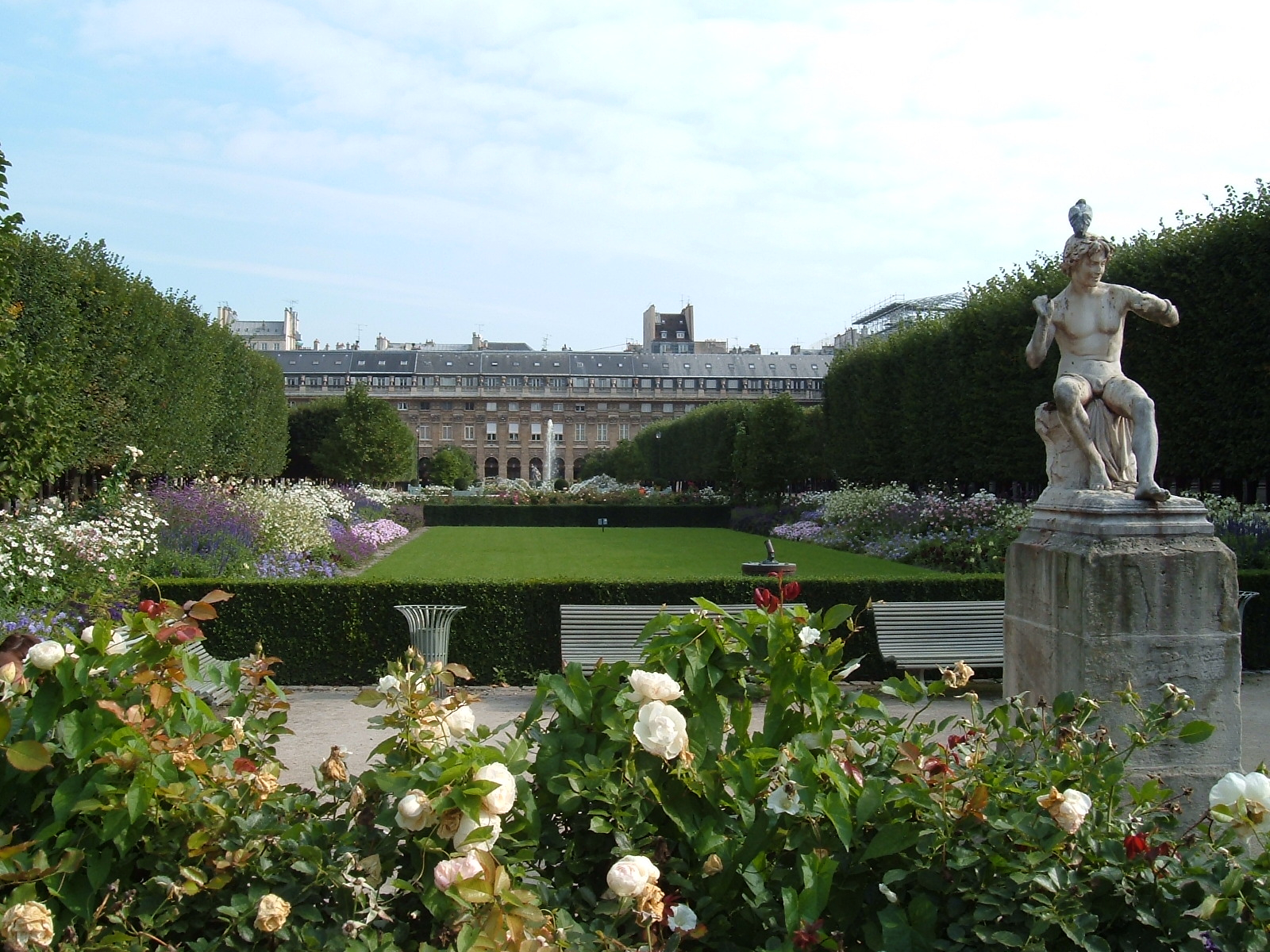 Paris Jardin du Palias Royal